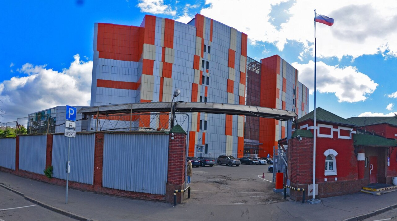 Главное здание компании PAL в Москве